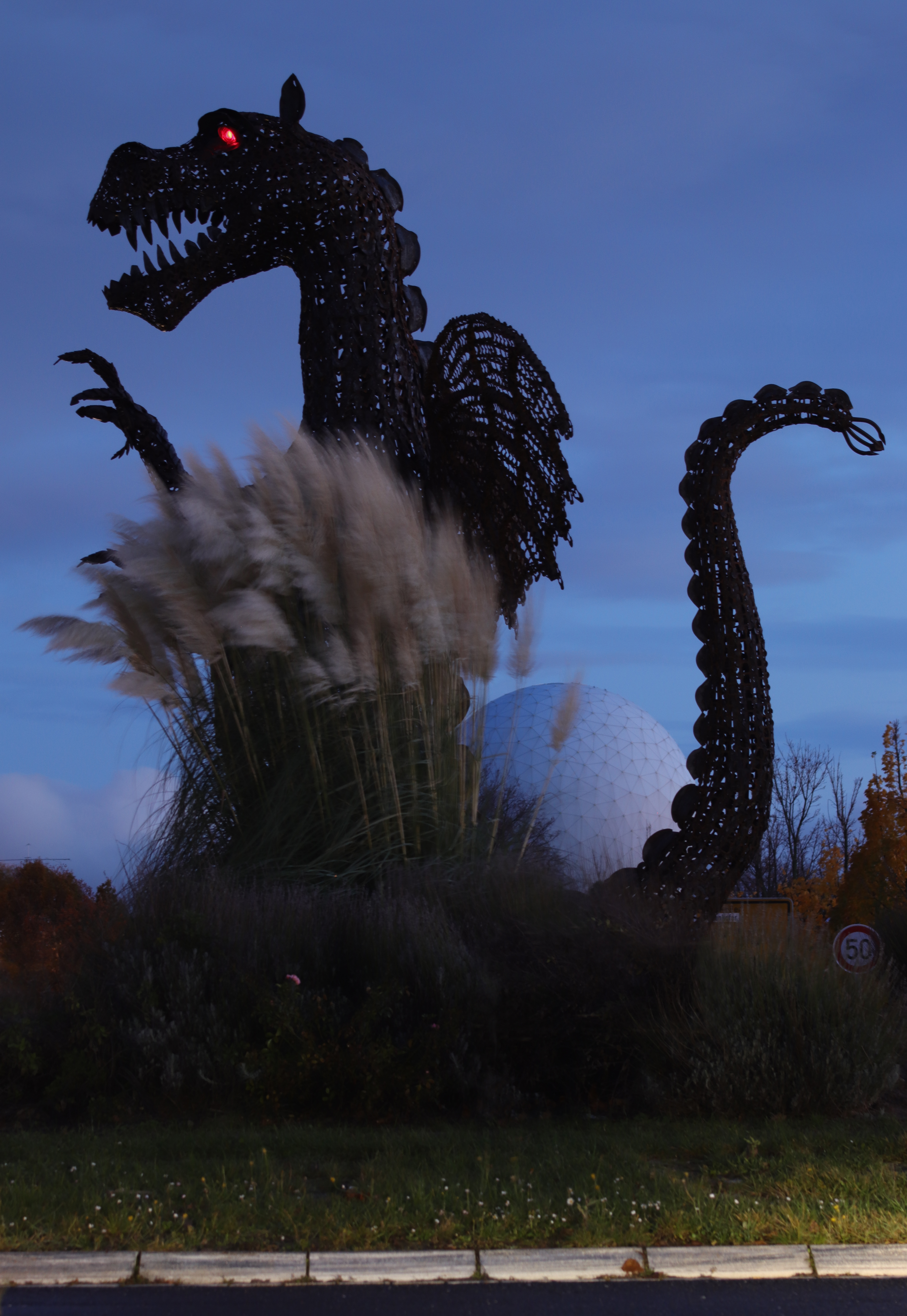 Der „Wachtberger Drache“ wurde auf Initiative des Fördervereins für Kunst und Kultur in Wachtberg e. V. (KuKiWa) im Rahmen eines Schulprojektes in Kooperation mit der Hans-Dietrich-Genscher-Schule Berkum erbaut. Anlässlich des 50-jährigen Bestehens der Gemeinde Wachtberg wurde die Skulptur am 26. September 2019 feierlich durch KuKiWa eingeweiht und an die Gemeinde Wachtberg übergeben. Die Betreuung der fachlichen und künstlerischen Gestaltung der Kunst im Kreisverkehr hat der Wachtberger Künstler Willi Reiche übernommen. Weitere Informationen unter